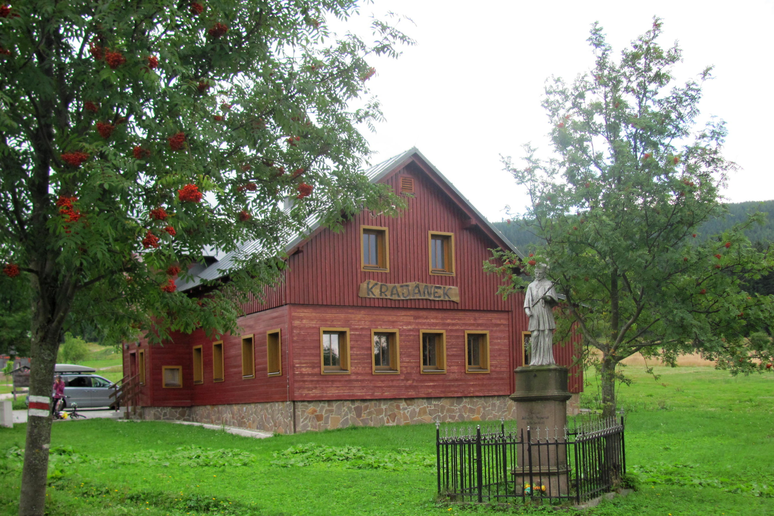 Horní Malá Úpa, Krkonoše